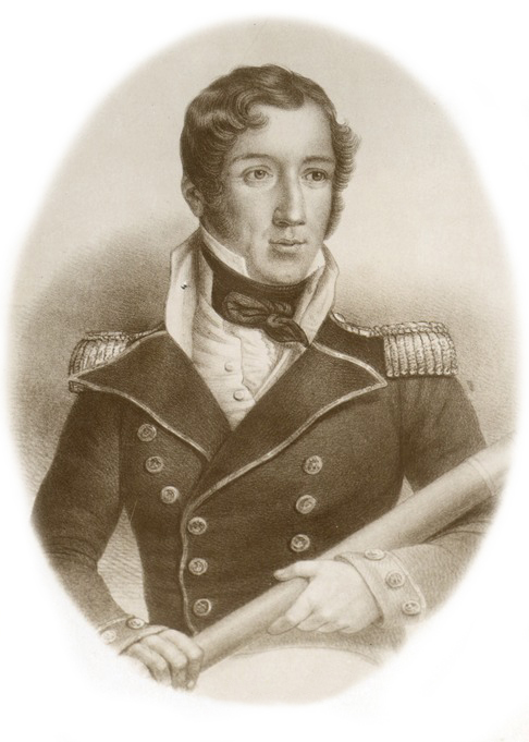 Thomas Alexander Cochrane, X conde de Dundonald, marqués de Maranhão (Annsfield cerca de Hamilton, 14 de diciembre de 1775 – Londres, 31 de octubre de 1860), conocido como Lord Cochrane.1 Fue un político radical, oficial e innovador naval británico. Considerado como uno de los capitanes británicos más audaces y exitosos de las guerras de la revolución francesa, lo que llevó a los franceses a apodarlo "le loup des mers" (el lobo de los mares). Después de ser dado de baja de la marina británica, sirvió en las marinas de Chile, Brasil y Grecia.